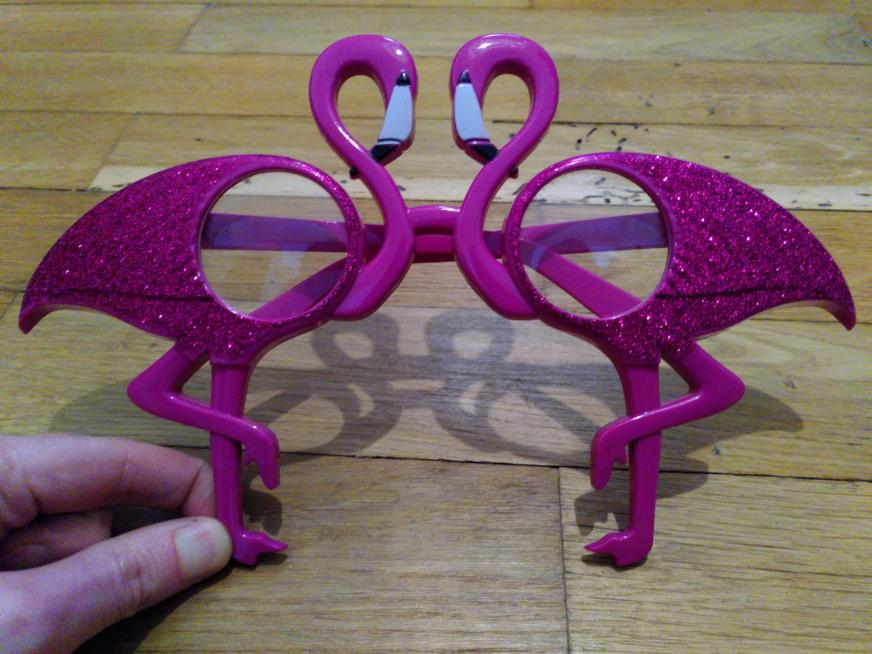 Des lunettes en plastique en forme de flamants roses avec des paillettes.